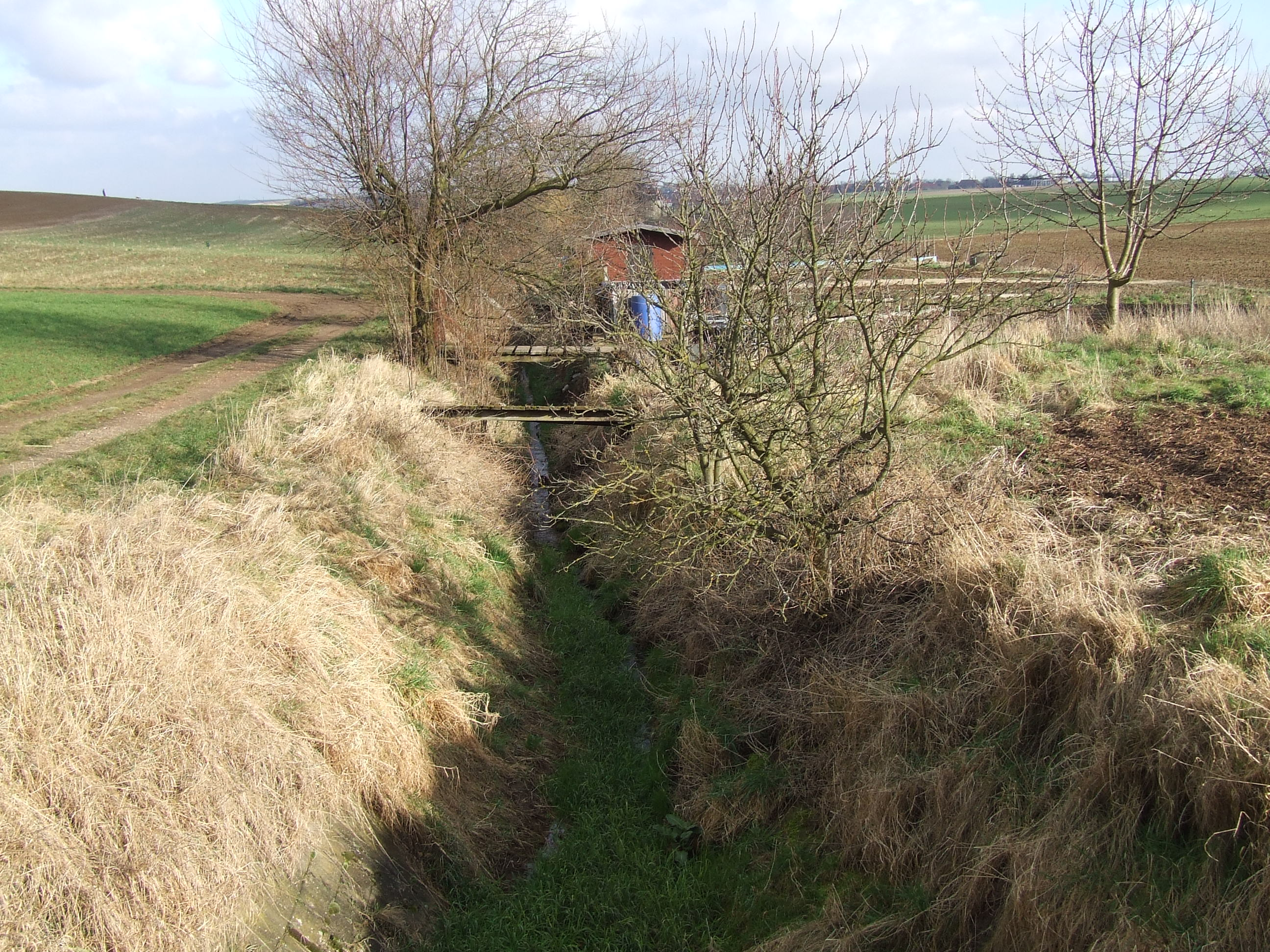 Selz (River), Selz